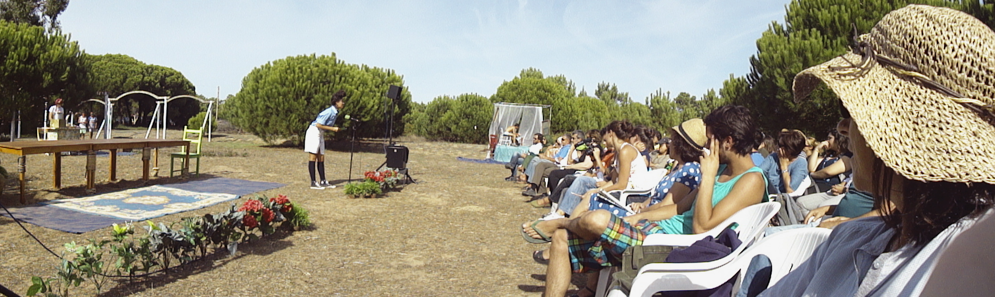 Porque vale a pena viver; direção de São José Lapa; textos de Harold Pinter, Bernardo Soares, Leonardo da Vinci, George Steiner e outras reflexões internas e alheias; Espaço das Aguncheiras, 2011